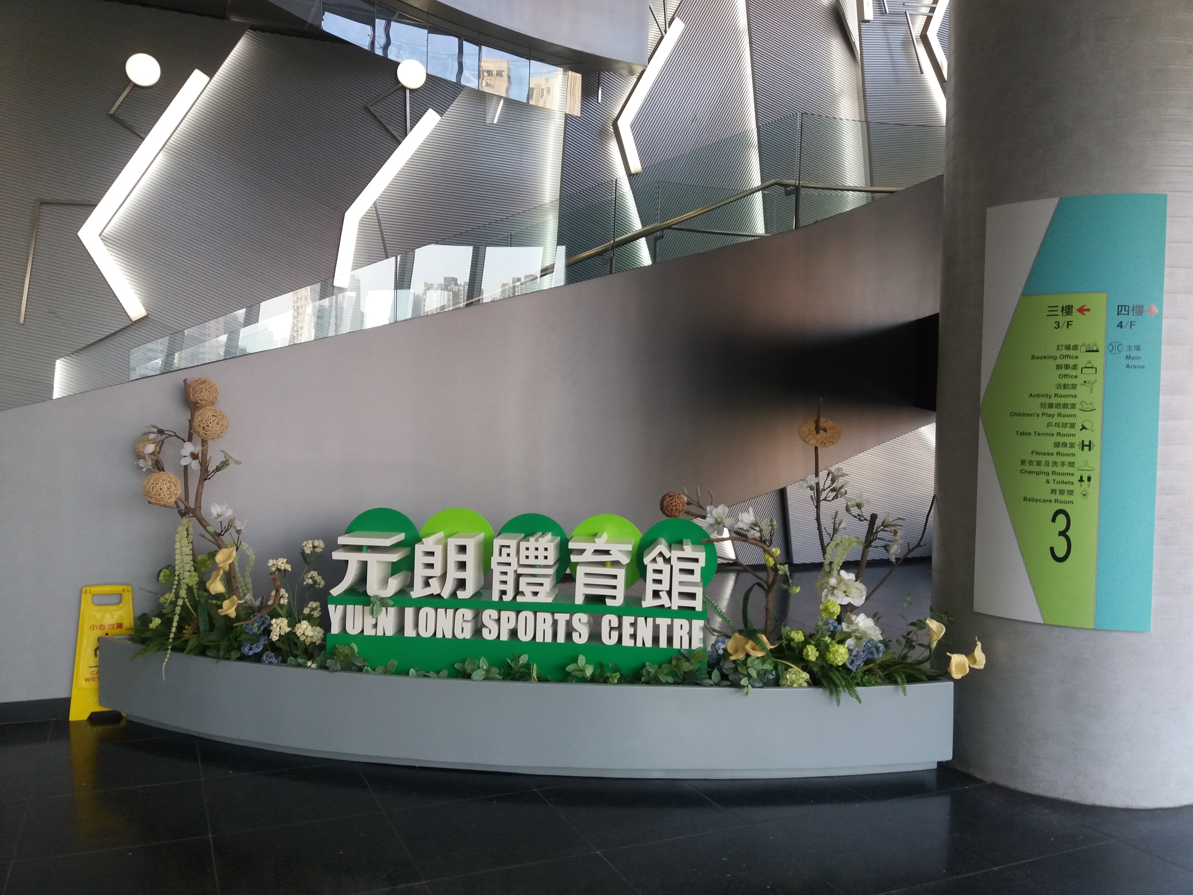 中文（香港）: 元朗體育館的文字雕象